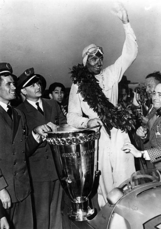 Bernd Rosemeyer mit Vanderbilt Cup Die ersten Original-Aufnahmen vom grössten Autorennen der Vereinigten Staaten. UBz: den Sieger im Vanderbilt-Rennen Ernst [Bernd] Rosemeyer mit dem Pokal. 12.7.1937 [Herausgabedatum] [New York.- Rennfahrer Bernd Rosemeyer mit Siegerpokal des Vanderbilt Cup am 5. Juli 1937] Abgebildete Personen: Rosemeyer, Bernd: Automobilrennfahrer, verheiratet mit Elli Beinhorn, Deutschland